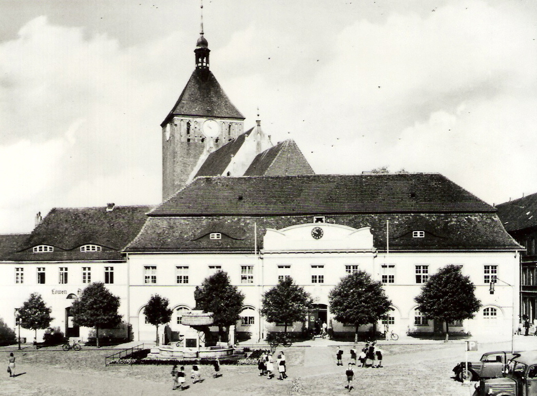 Darłowo ok. 1935